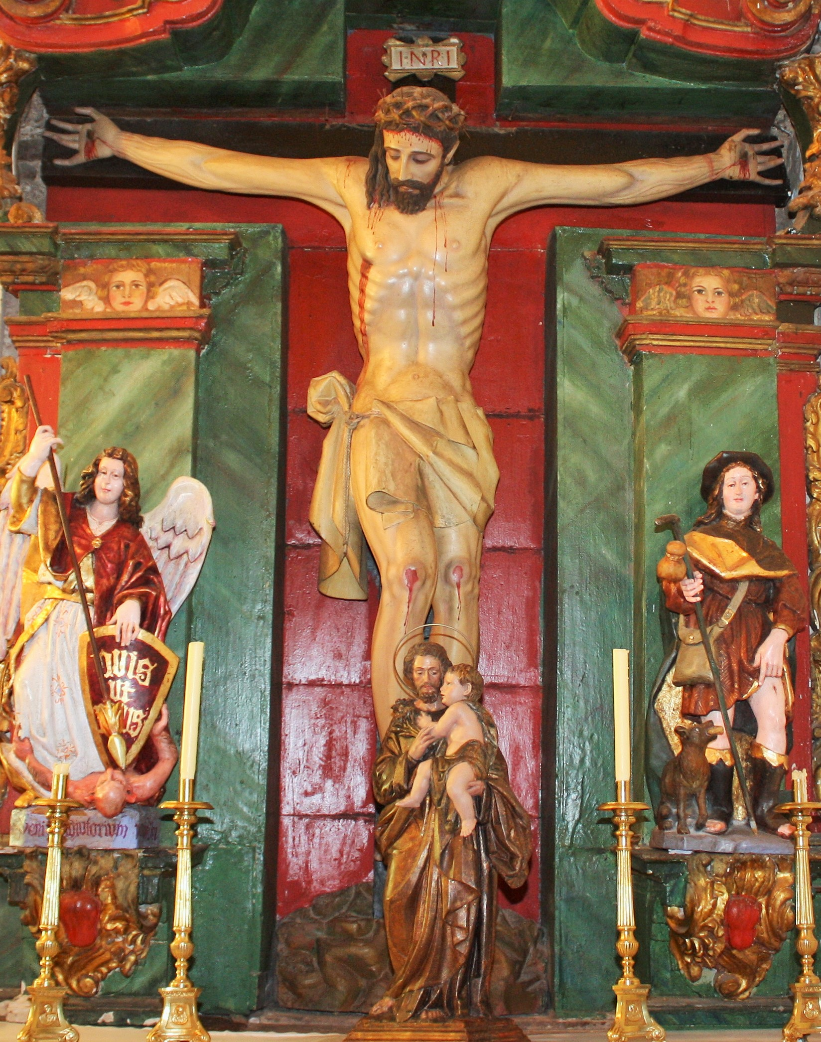 Santuario de Lugás. Villaviciosa. Asturias